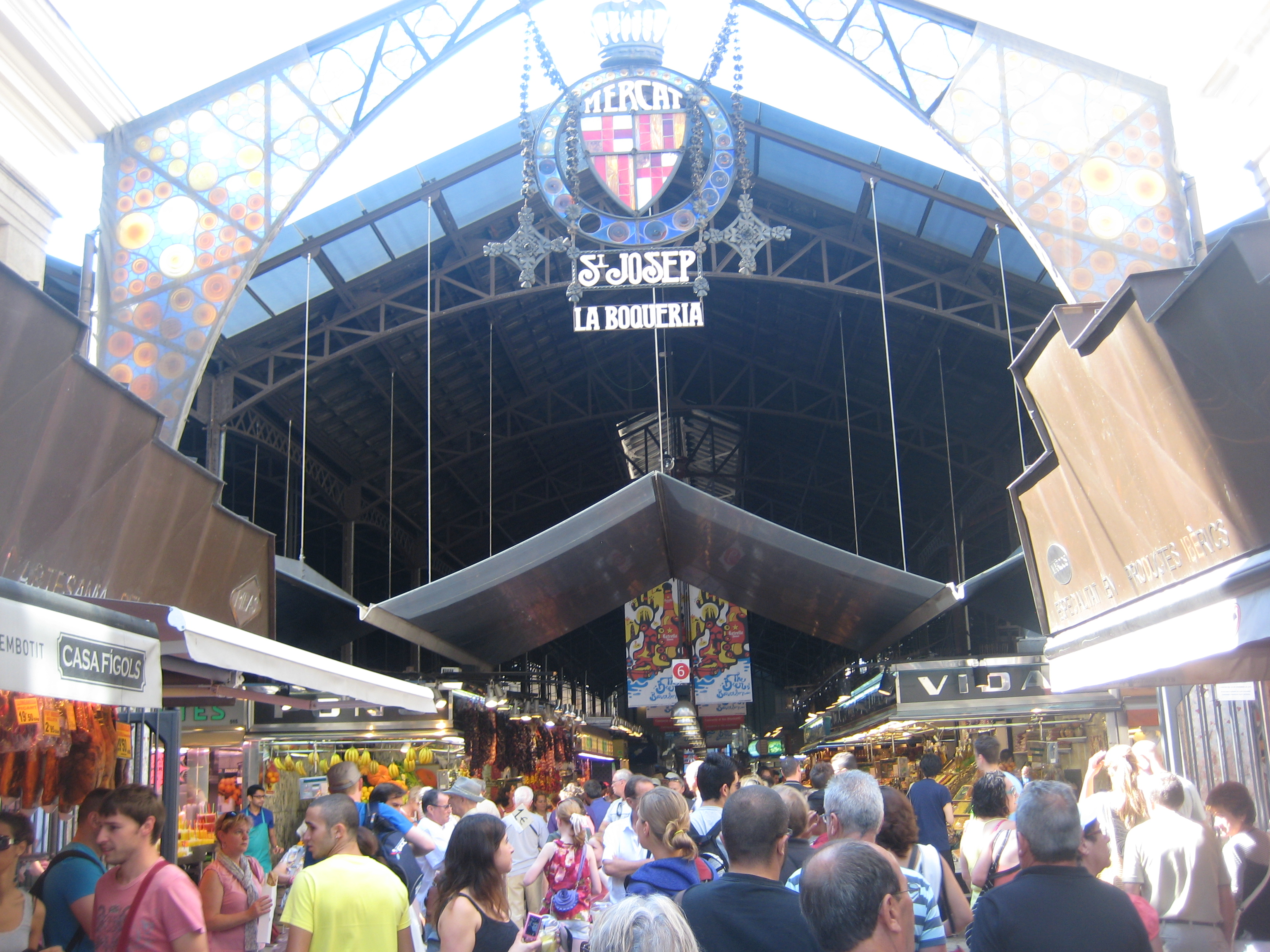 Барселона, рынок Бокерия на Рамбле